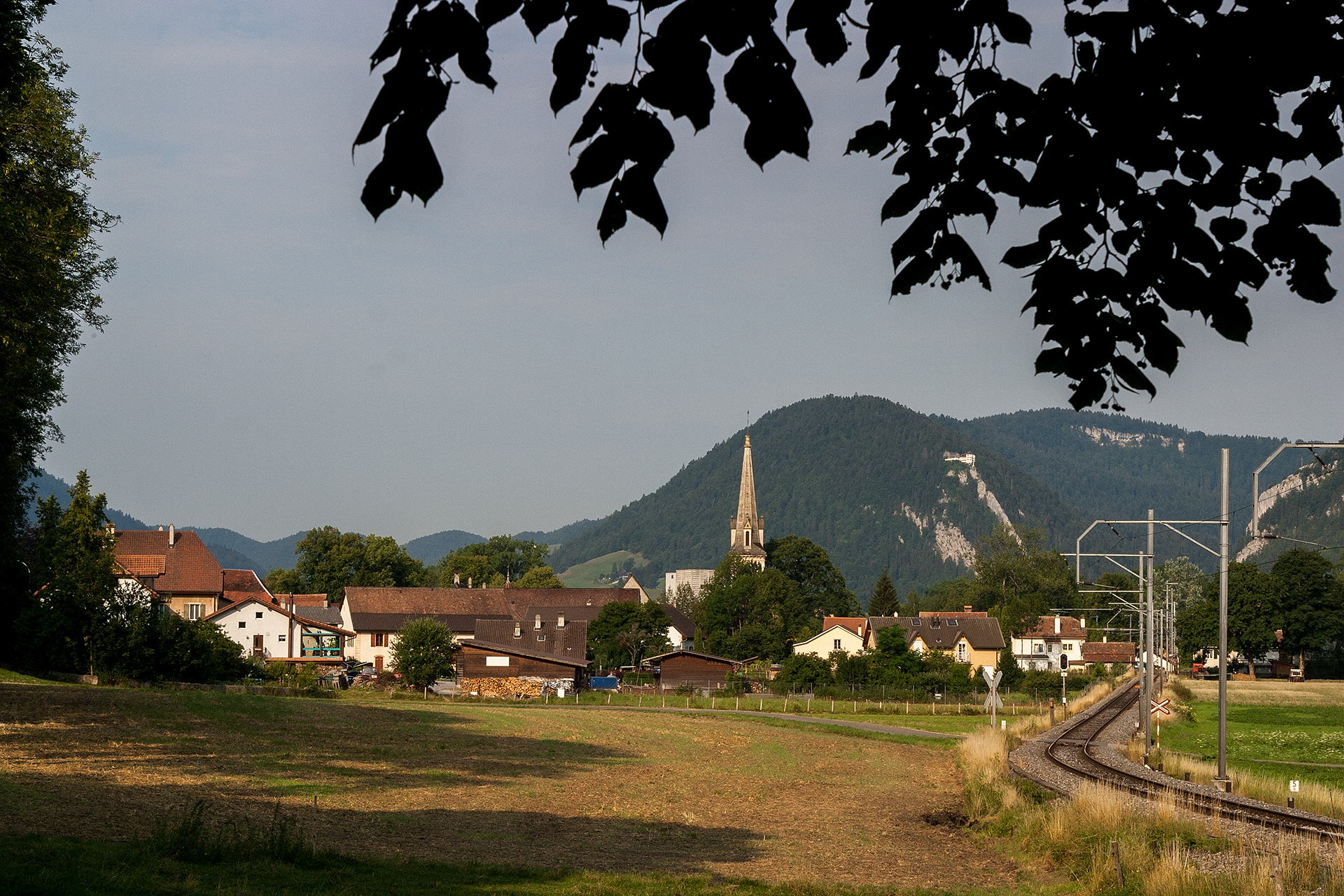 Blick nach Môtiers (NE)